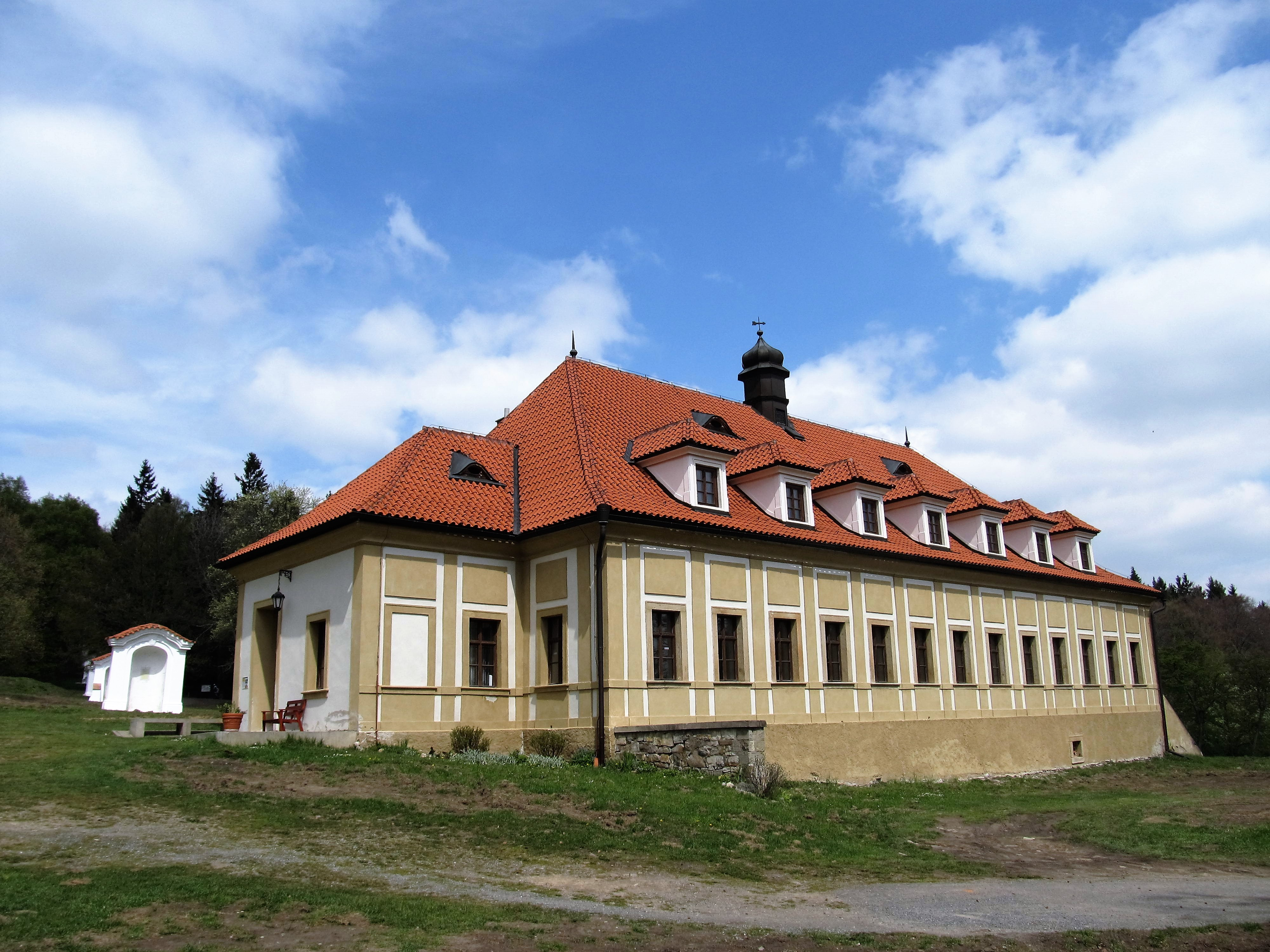 Klášter Skalka s křížovou cestou u Mníšku pod Brdy